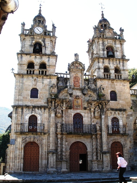 Santuario das Ermidas, O Bolo